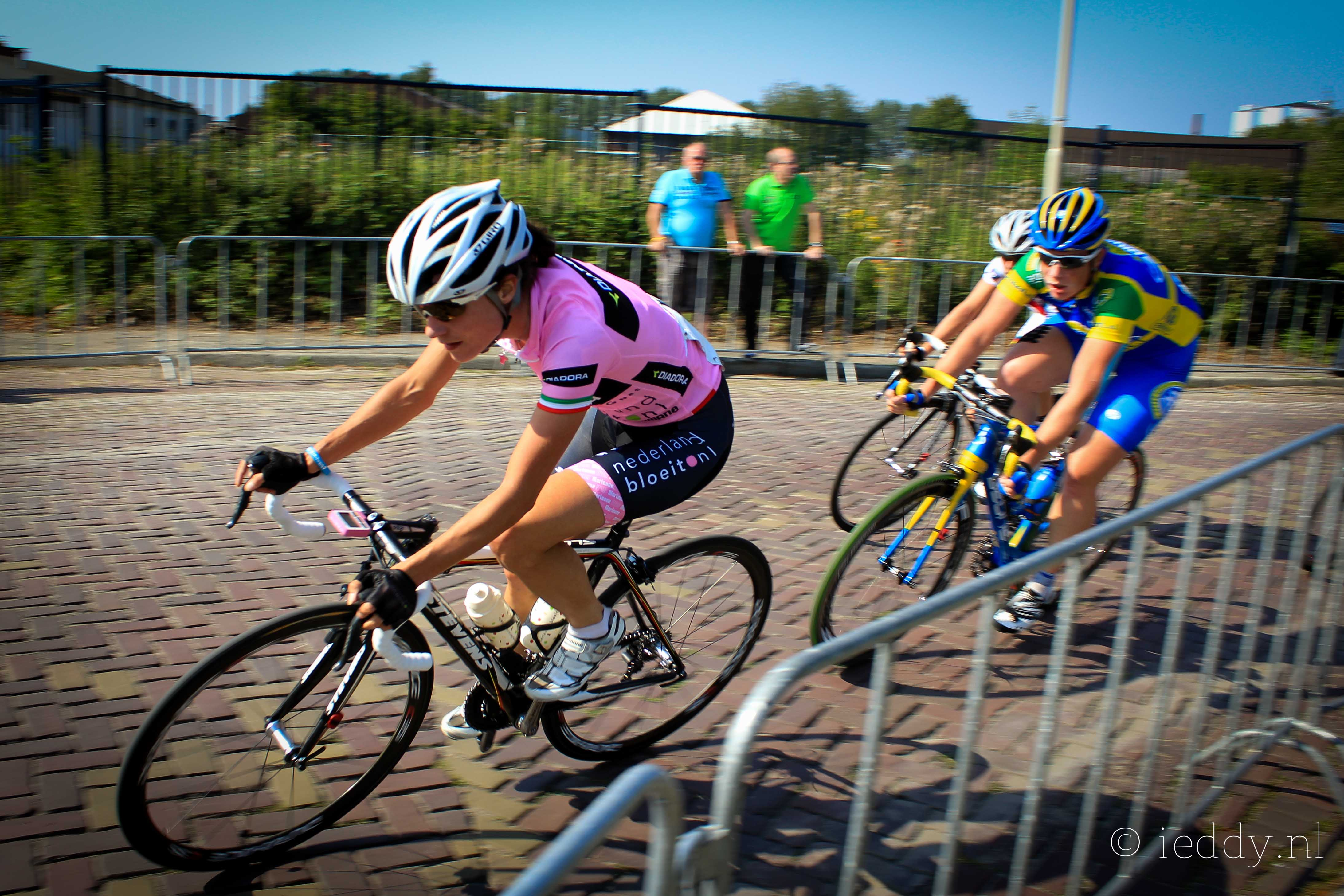 Marianne Vos, Kirsten Wild Draai van de Kaai 2011